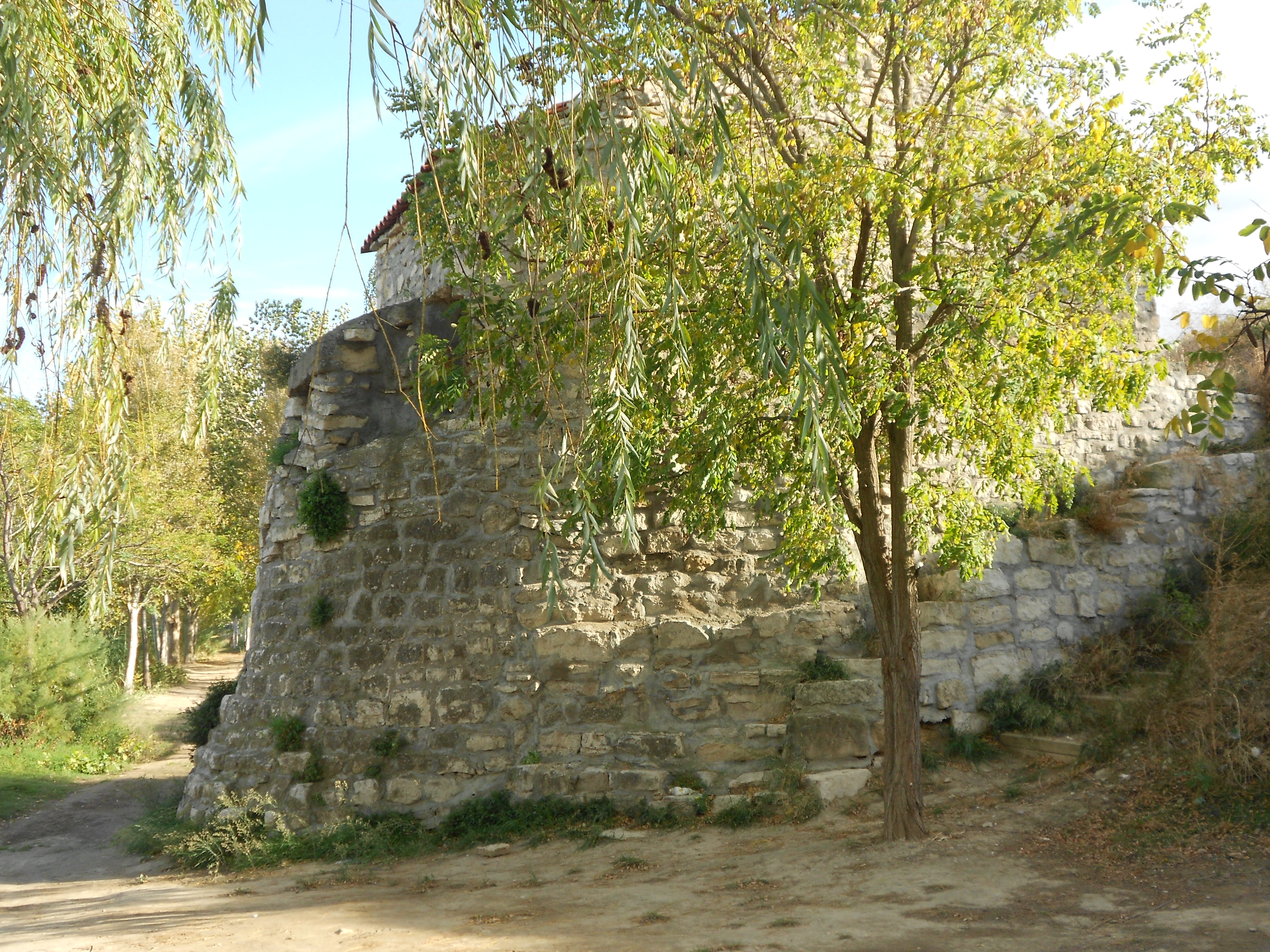 Caseta para la sirga, en la margen derecha del Ebro (Escatrón, España)